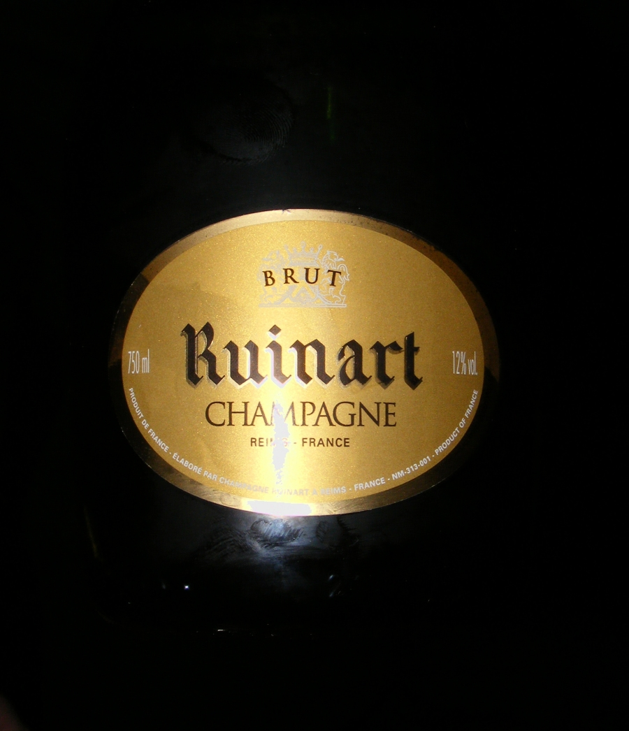 Bouteille de champagne Ruinart